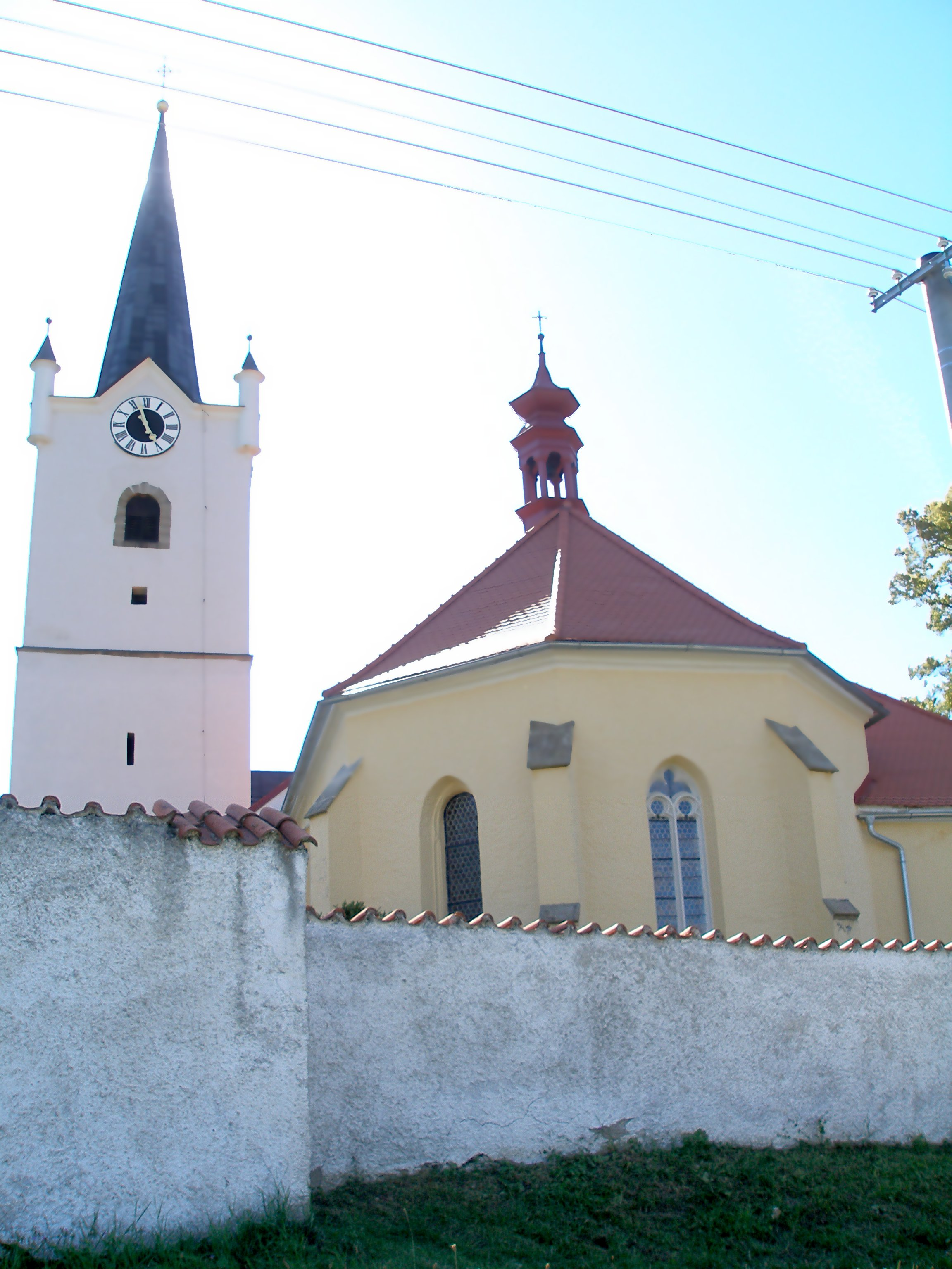 Závěr presbytáře malšínského kostela srdce Ježíšova s odkrytým gotickým oknem